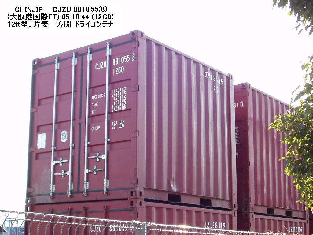 日中間で国際フェリーを使って輸送される、10ftドライコンテナ。中国、CHINJIF社所有。【 2005.10.-- 大阪港国際フェリーターミナルにて、撮影 】